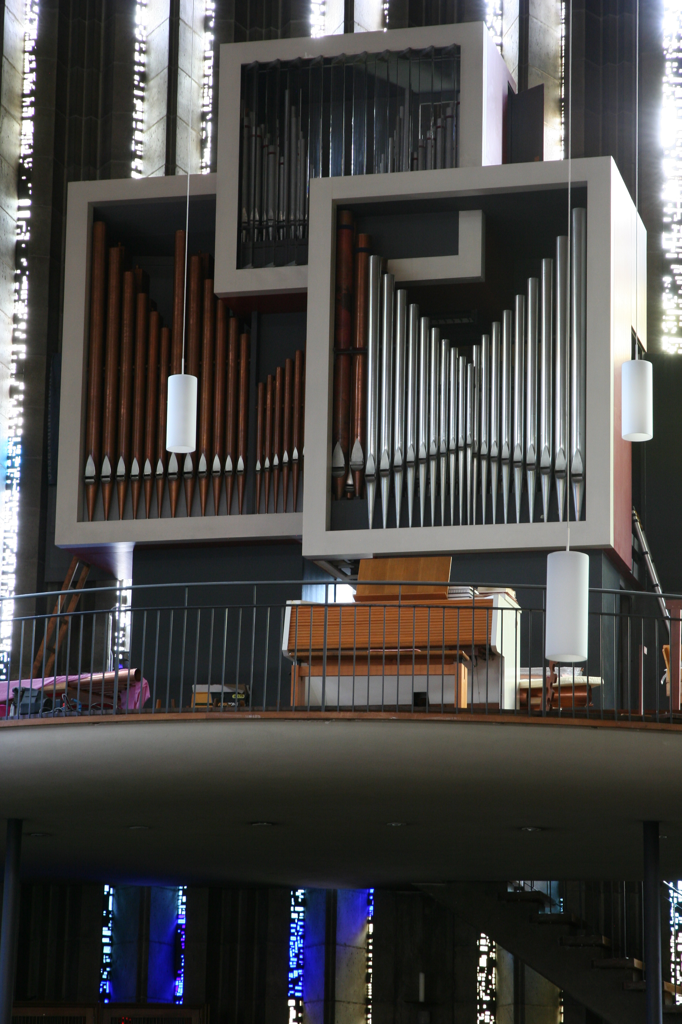 Römisch-katholische Pfarrkirche St. Josef Baden-Baden